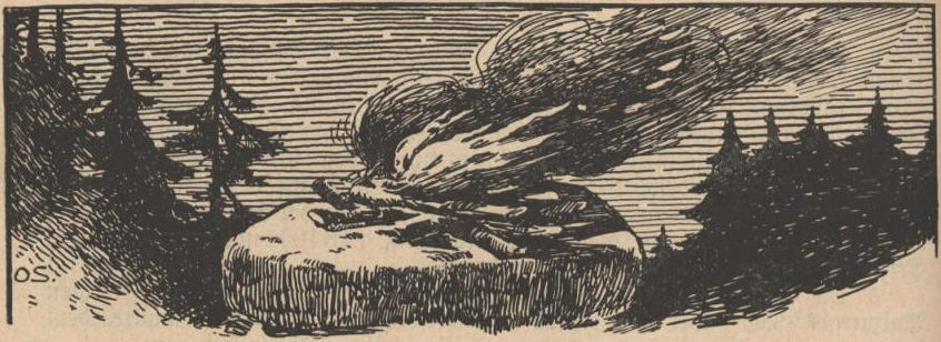 Beiträge zur Sächs. Volks- und Heimatkunde. Mit Zeichnungen von Professor O. Seyffert und Maler F. Rowland.